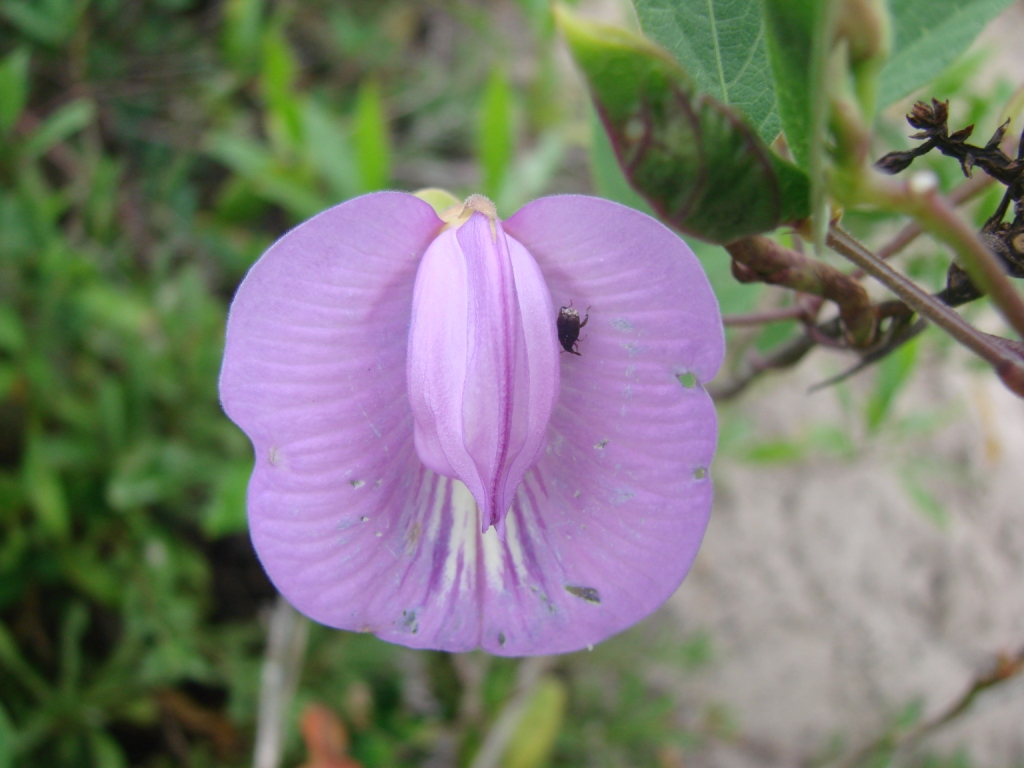 Centrosema virginianum - FABACEAE - Praia do Mo�ambique - Florian�polis - SC - Brasil